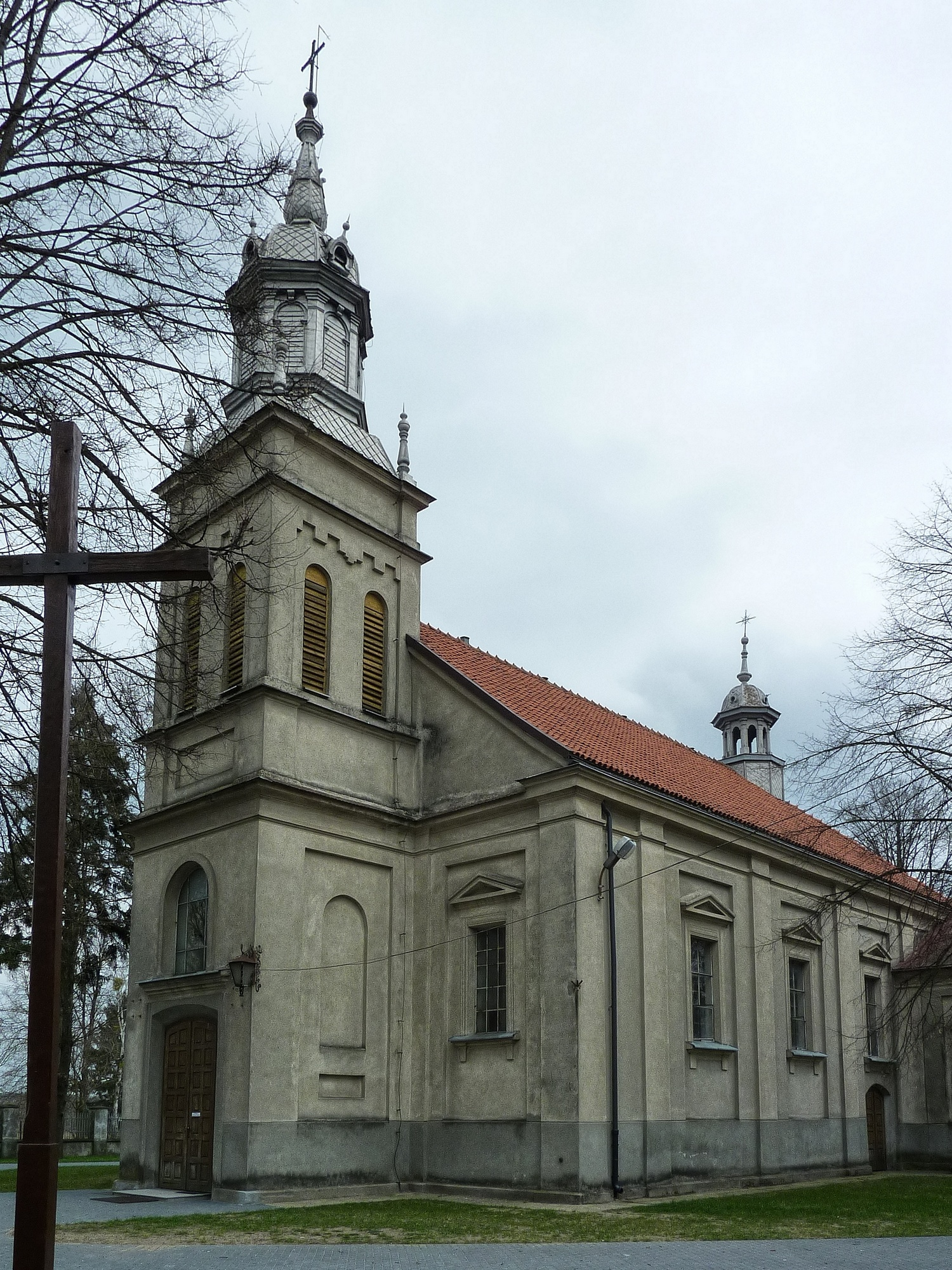 Kościół pw. św. Jakuba w Koziebrodach.